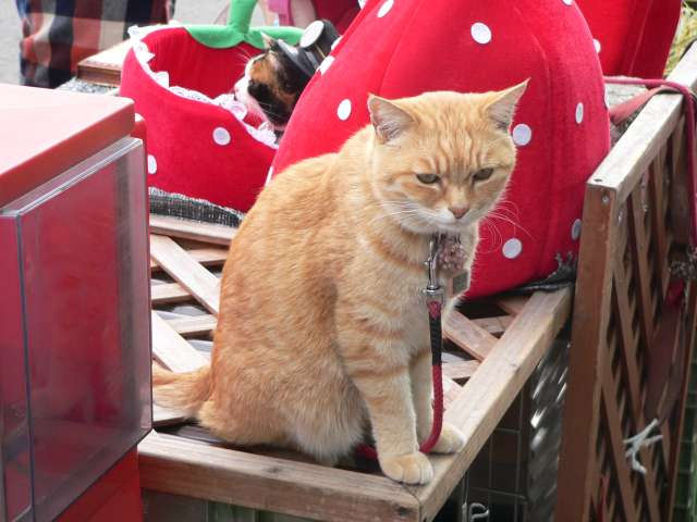 和歌山電鐵貴志川線貴志駅の「ミーコ助役」